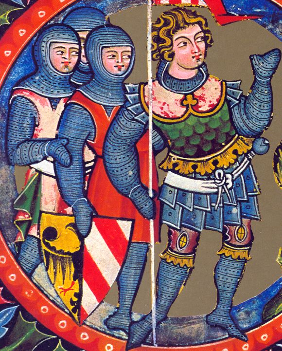 Azzo von Kuenring und 3 Ritter